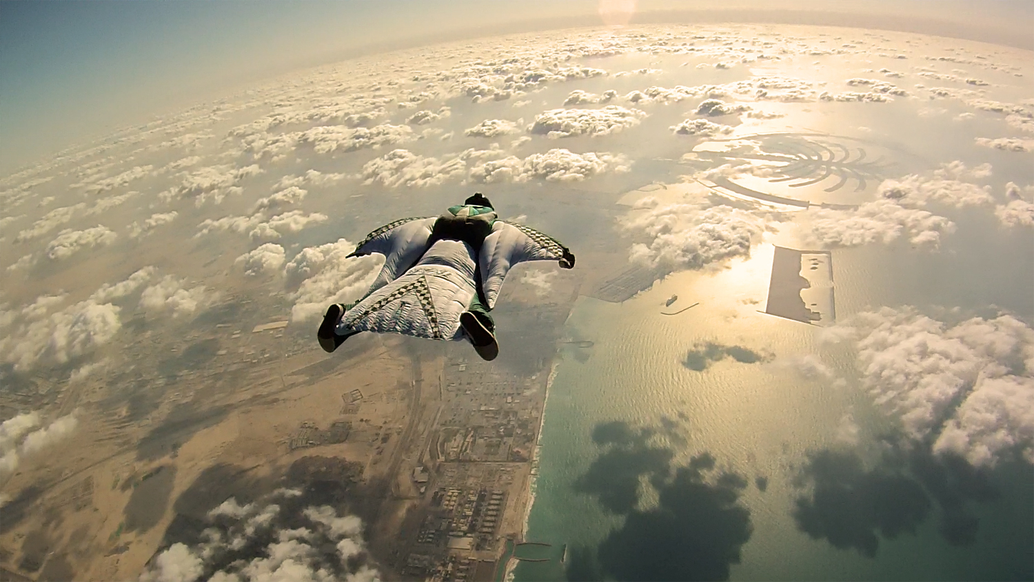 Dubai Wingsuit Flying Trip